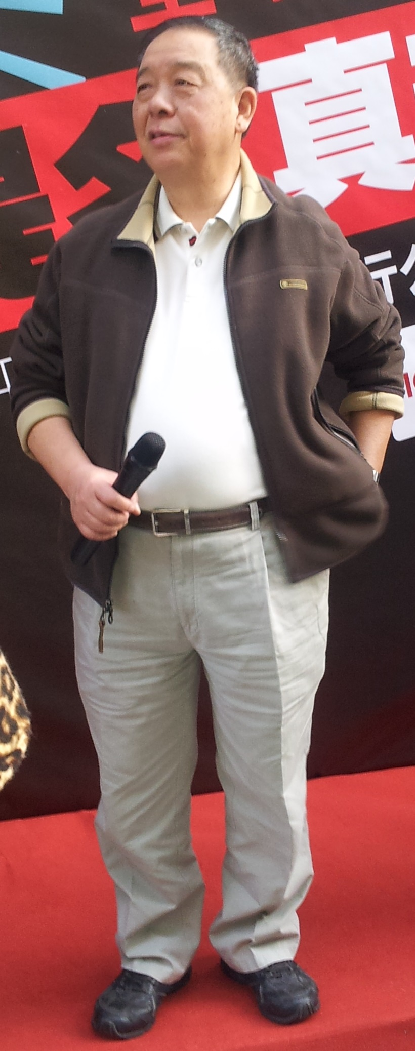 中文（香港）: 吳明林(英文名：Michael Ng)，香港資深傳媒工作者。1969年，香港中文大學新聞及傳播學系畢業，同年加入《星島日報》。1975年，吳明林獲得香港記者協會「最佳記者獎」，翌年考取獎學金，負笈威爾斯卡迪夫湯普遜基金會修讀財經新聞。 吳明林亦曾到英國BBC電台及夏威夷東西文化中心等機構進修。吳明林曾任香港電台新聞部總編輯及總監，1983年擔任香港電台新聞主管，亦是該電台時事節目《城市論壇》、《議事論事》、《頭條新聞》的始創人及第一代節目主持。